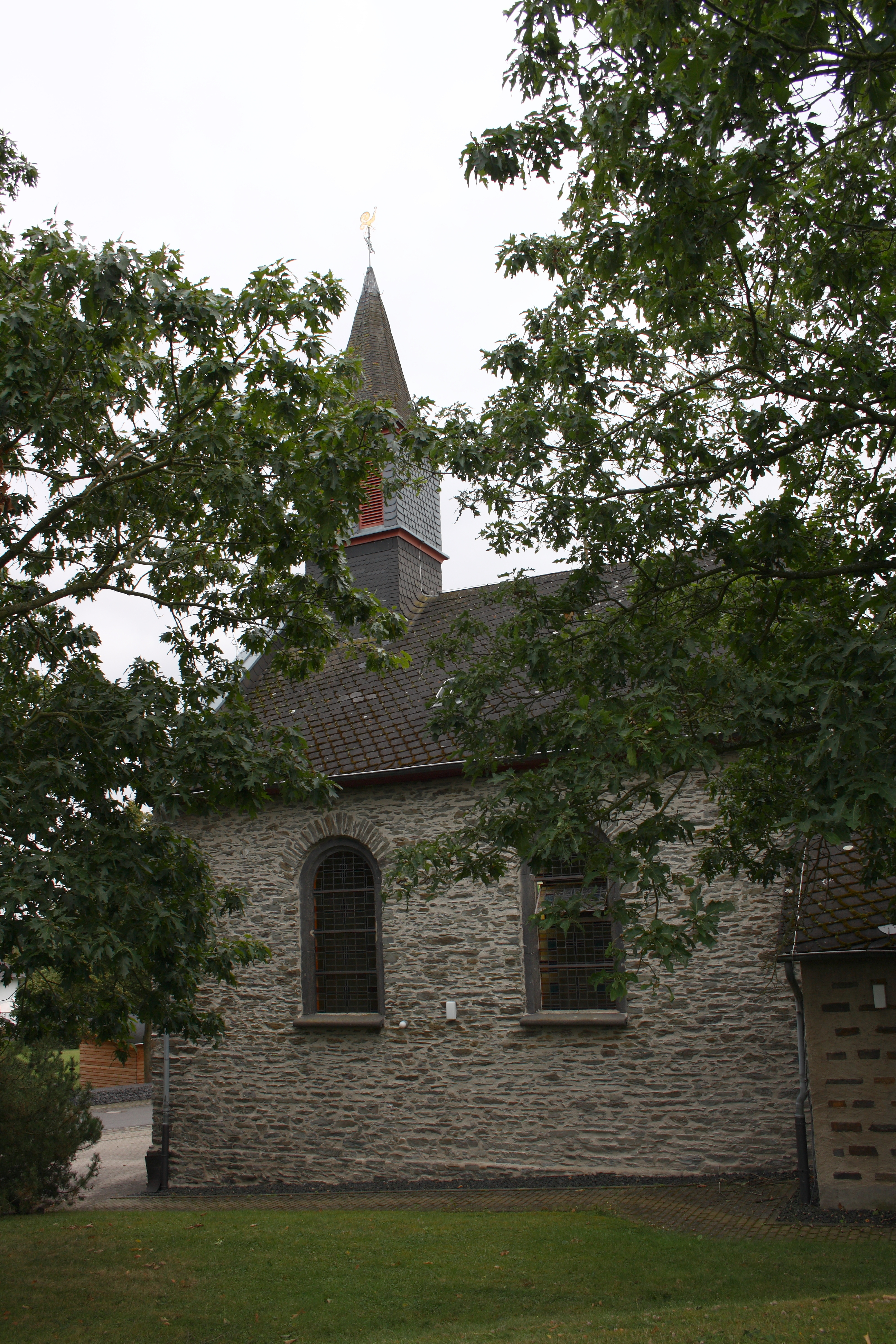 Katholische Kirche St. Laurentius in Möntenich im Landkreis Cochem-Zell (Rheinland-Pfalz)